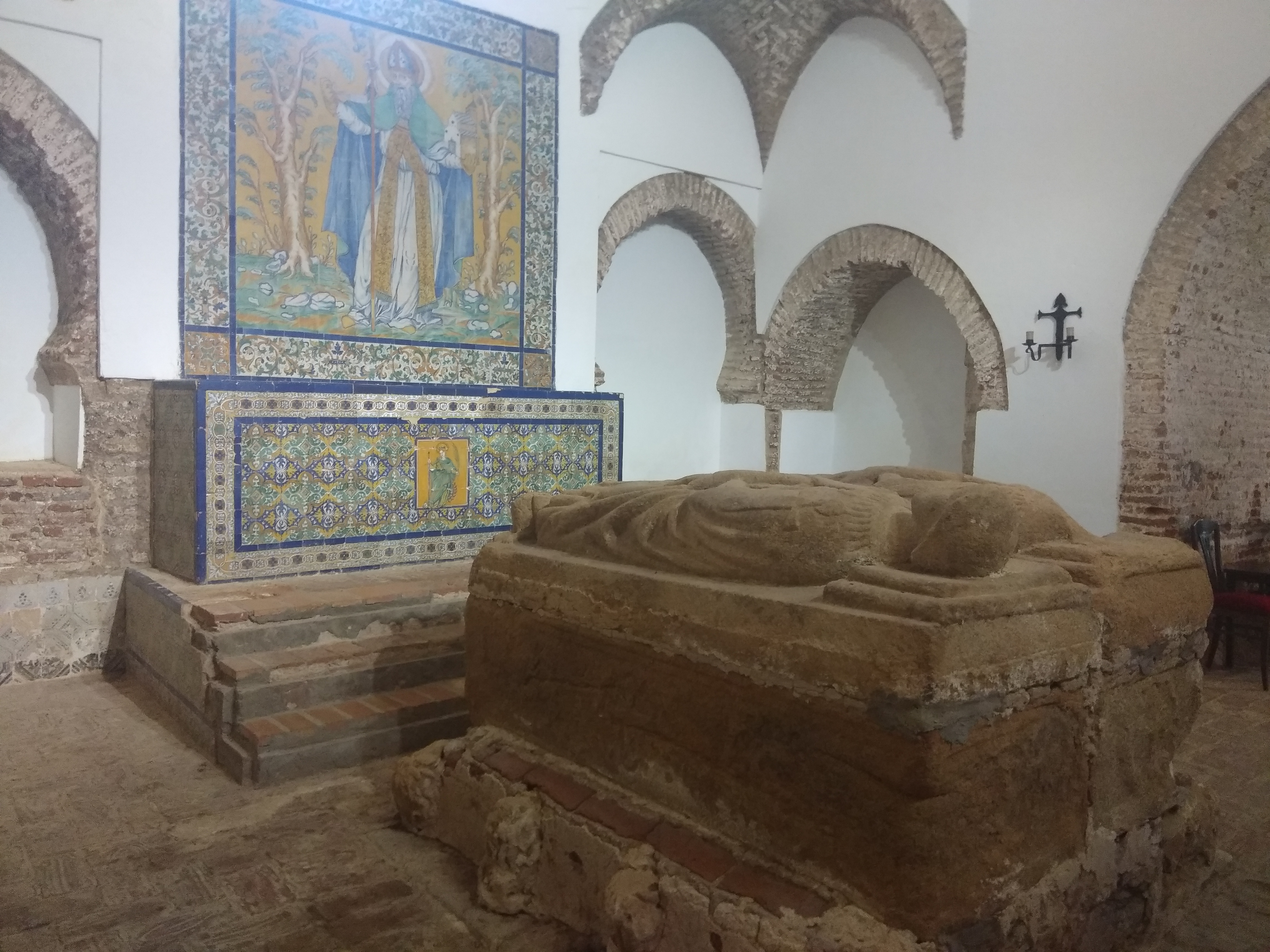 Monsnasterio de Tentudía, Badajoz, España, arte mudejar, capilla de los maestres de la orde de Santiago